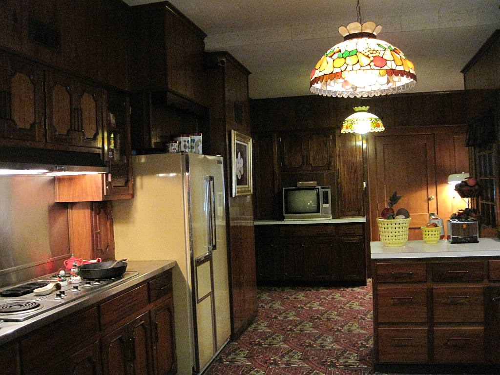 Graceland, Memphis, Tennessee. Kitchen